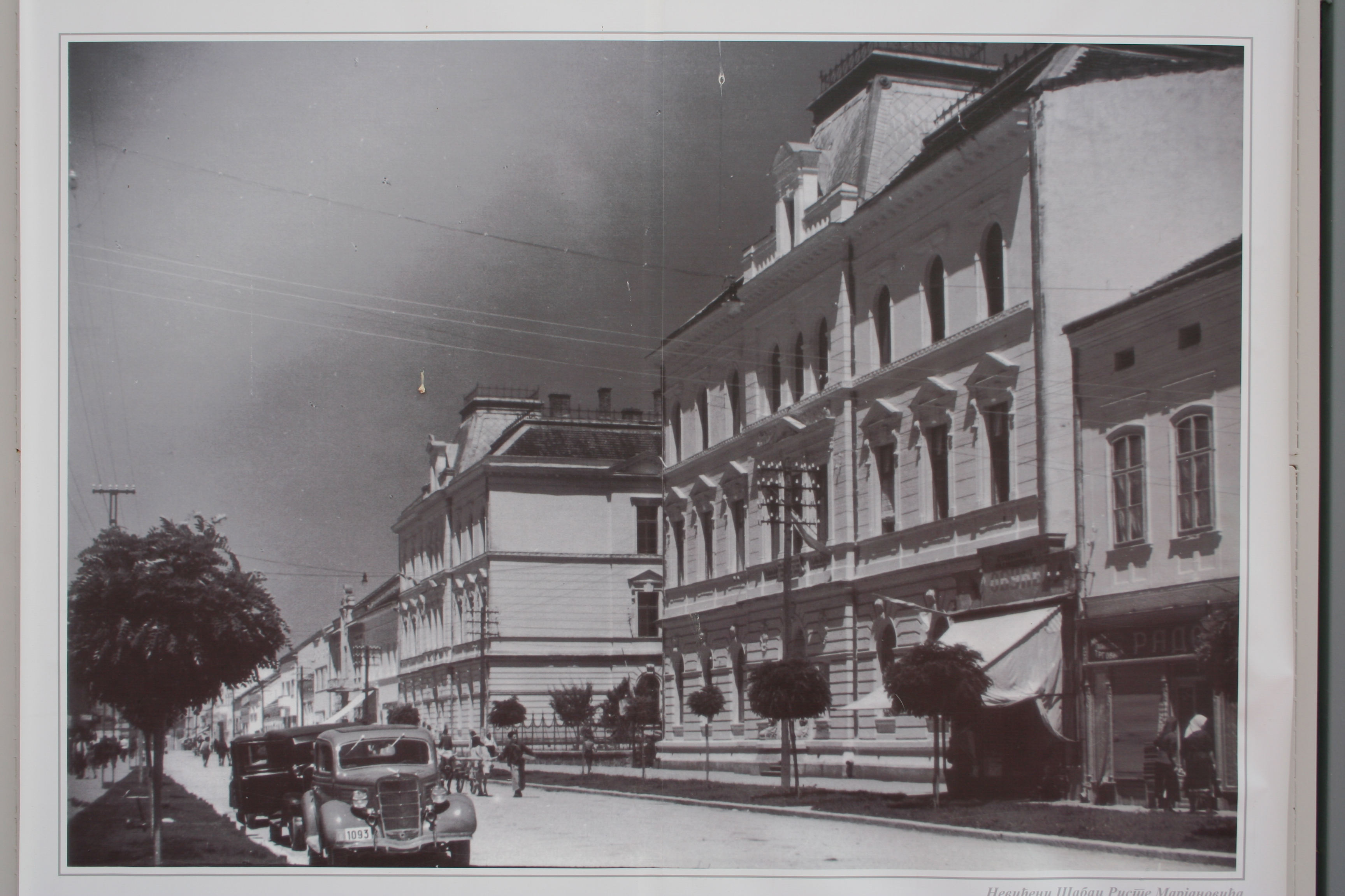 Izložba slika starog Šapca, autora Riste Marjanovića na otvorenom